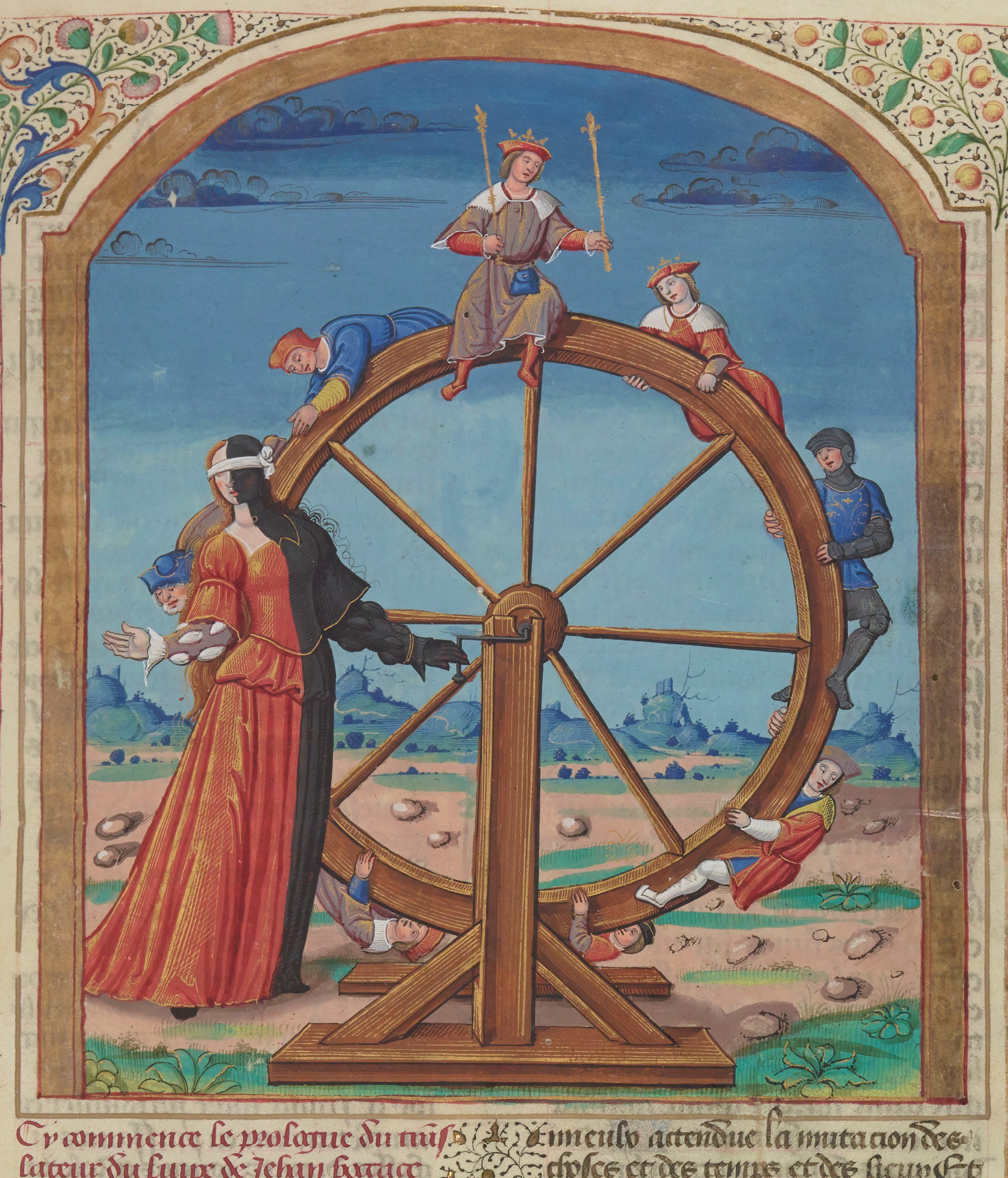 Fortune double (bonne fortune et mauvaise fortune, symbolisées par son côté blanc et son côté noir) tournant sa roue, aveugle aux conditions sociales de ceux à qui elle porte chance ou malchance (symbolisé par le bandage sur ses yeux). BnF ms fr. 130